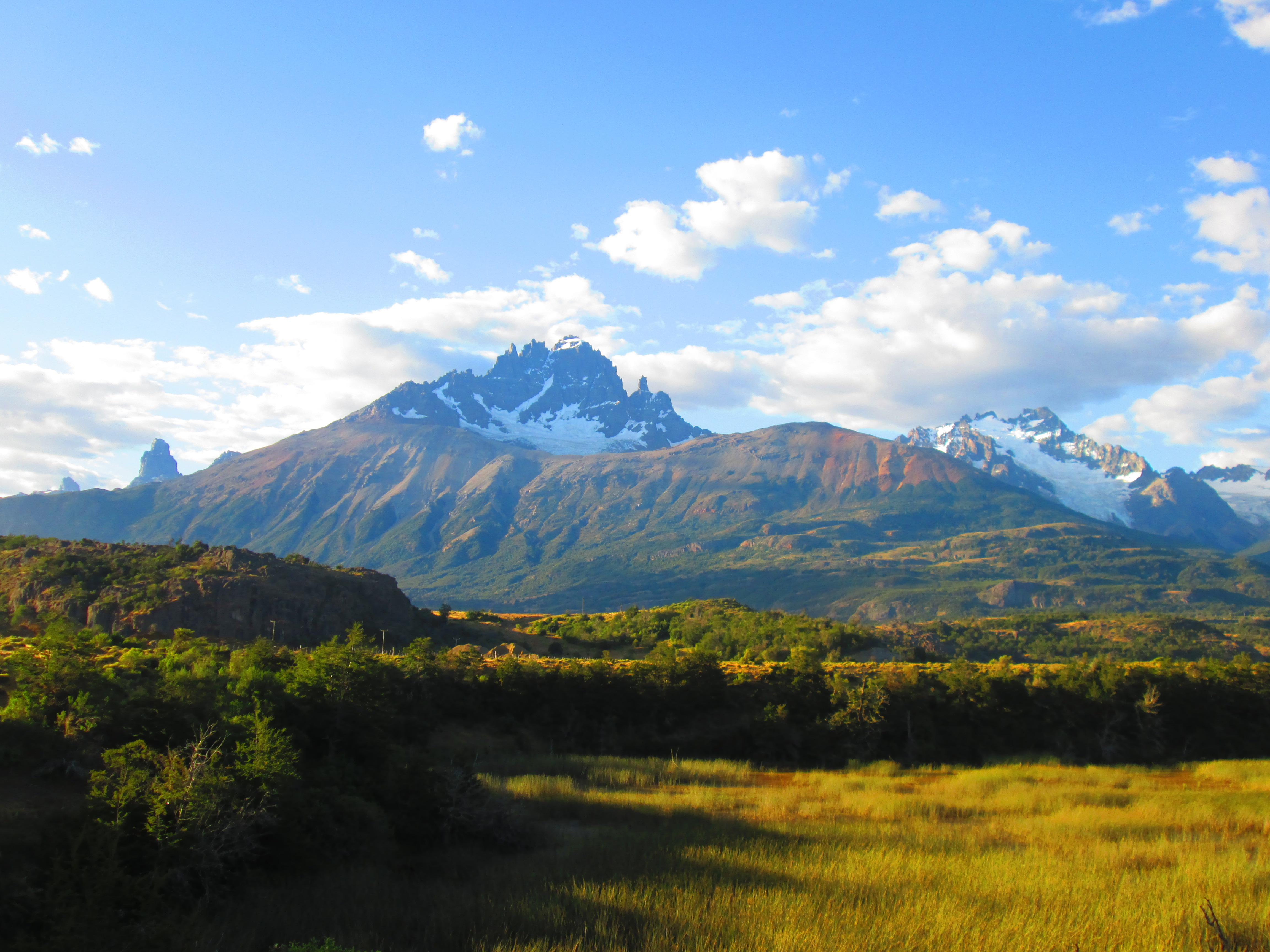 Vista hacia Cerro Castillo desde el camino hacia la Cueva de las Manos, al sur de Villa Cerro Castillo, región de Aysén.